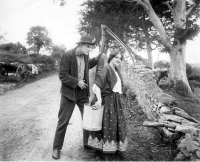 The Mayor From Ireland